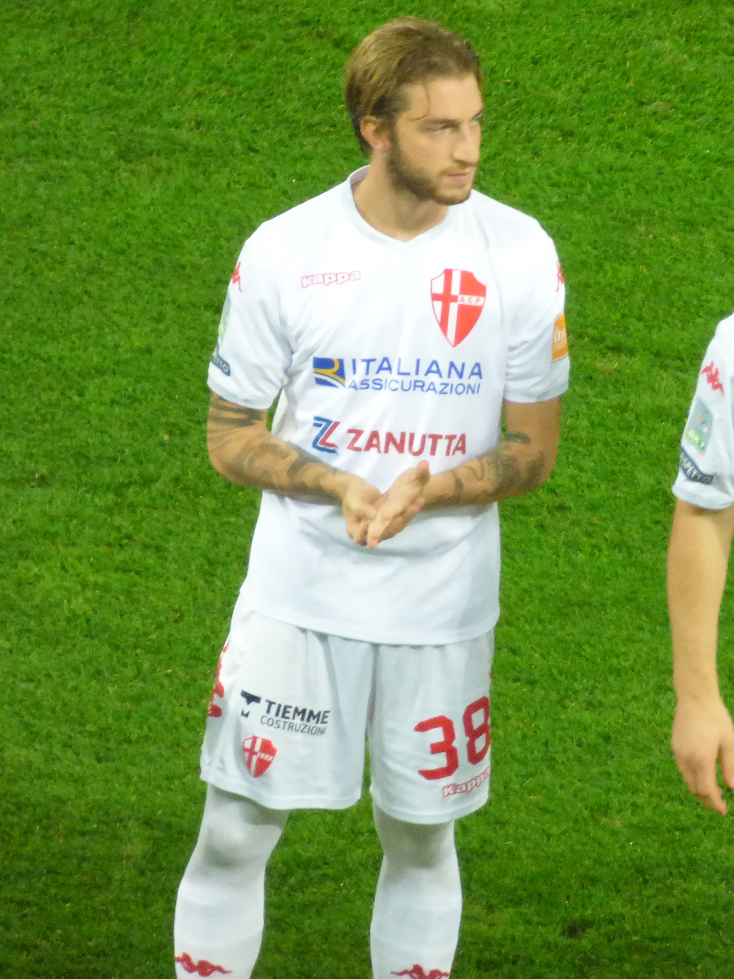 Luca Clemenza lors du match amical RC Lens - Calcio Padova, le 11 octobre 2018 au Stade Bollaert-Delelis de Lens.